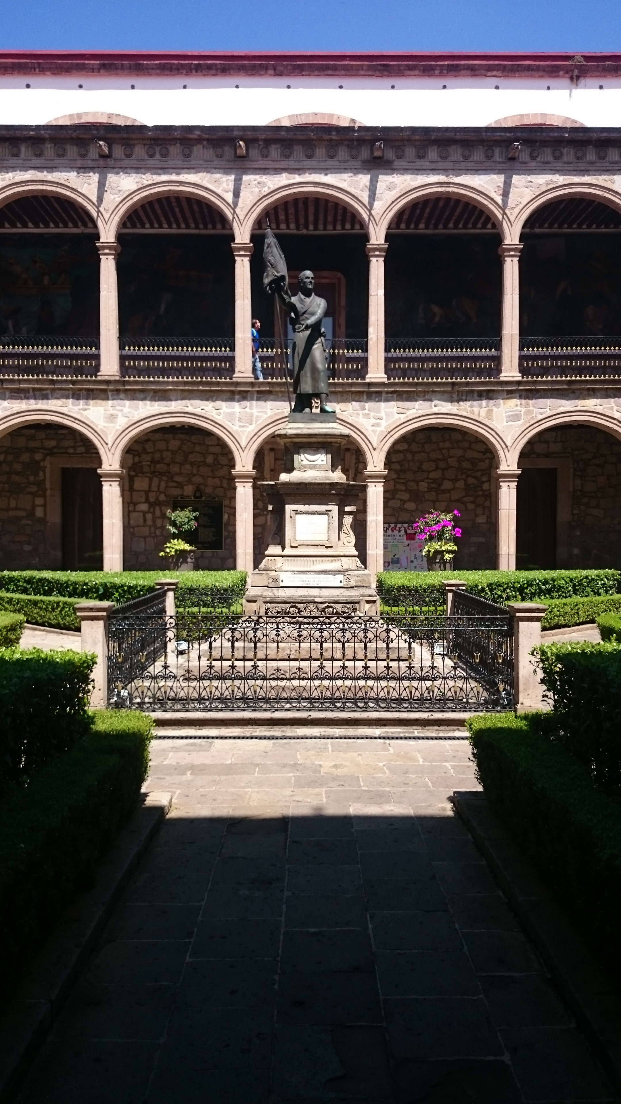 interior del Colegio Primitivo y Nacional de San Nicolas de Hidalgo